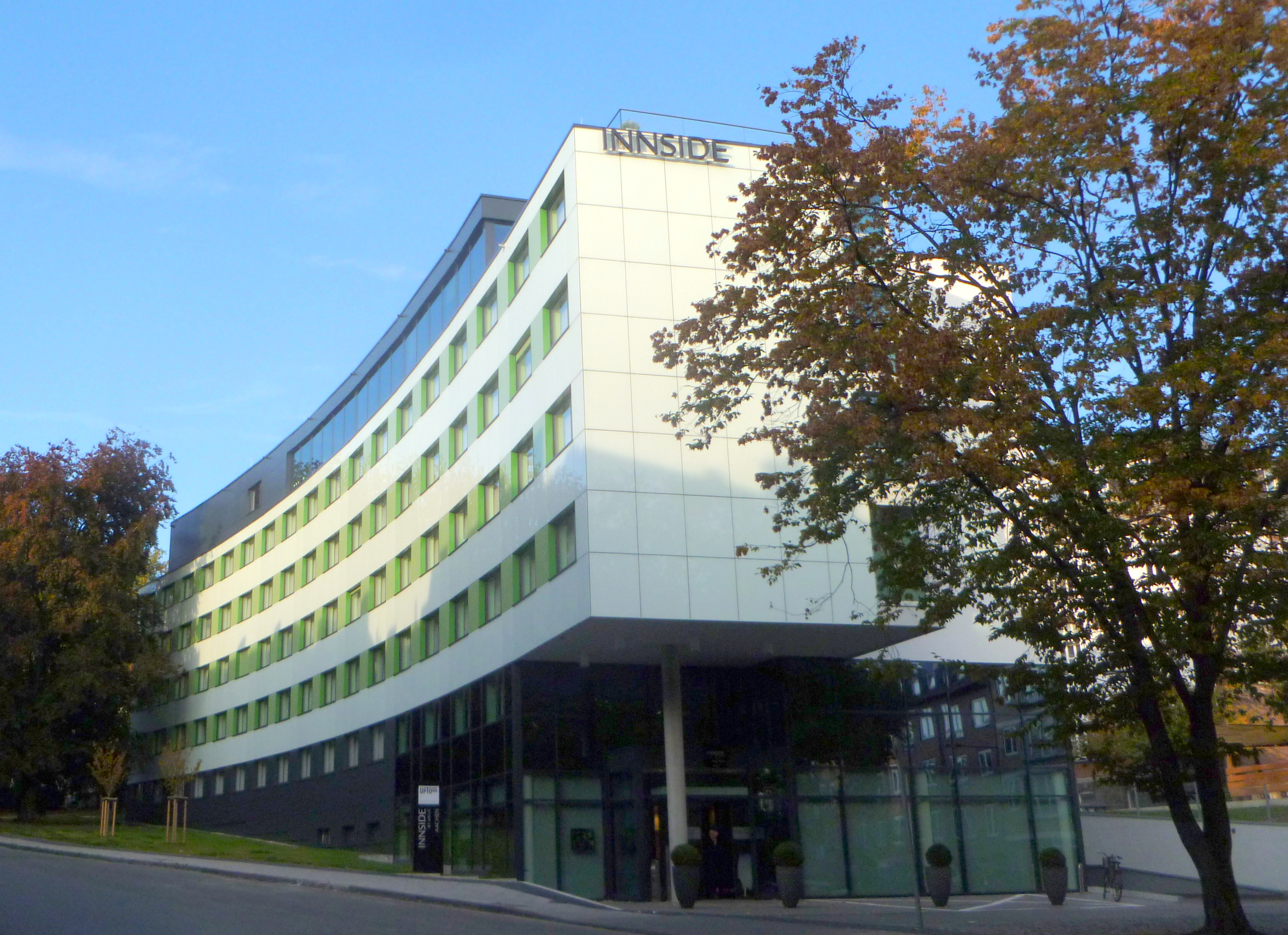 Hotel am Sandkaulpark in Aachen, an Stelle des abgerissenen Bunkers